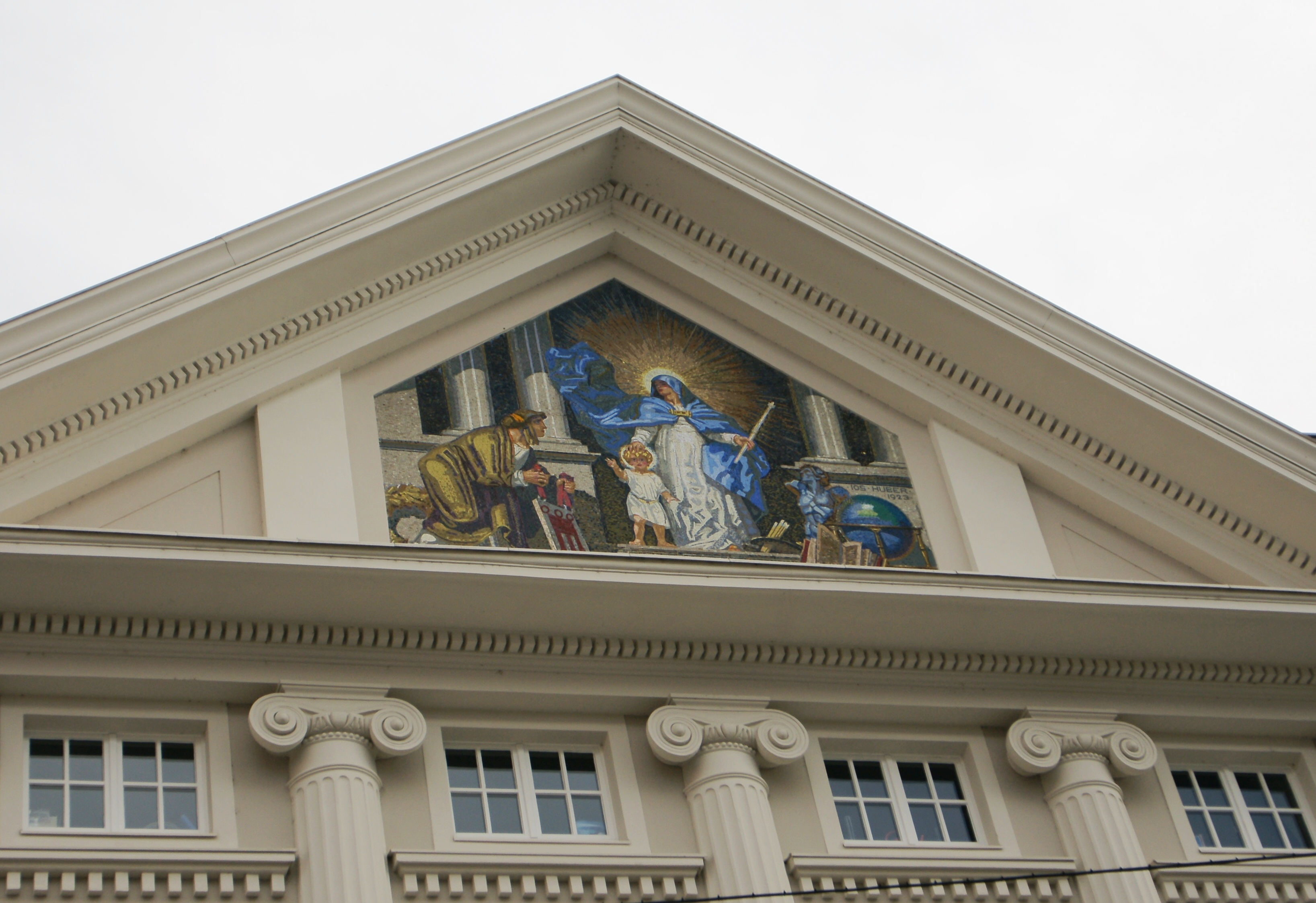 aus dem DEHIO Vorarlberg 1983: Bregenz, Bahnhofstrasse Nr.:3 - Ecke Jahnstraße: ehemals Landhaustrakt mit Landtagssitzungssaal, erbaut von Willibald Braun, 1921. Neoklassizistisch, 4geschossig, Giebelfront zur Bahnhofstraße mit ionischen Halbsäulen, Beletage mit Balkon und Dreieckgiebelverdachungen, Giebelmosaik von “Joseph Huber-Feldkirch”, 1923, Eckplastik Ehreguta von “Josef Piffrader”, 1923. Zur Jahnstraße in flachem Bogen risalitartig vorspringender Mittelteil, Seitenteile übergiebelt.